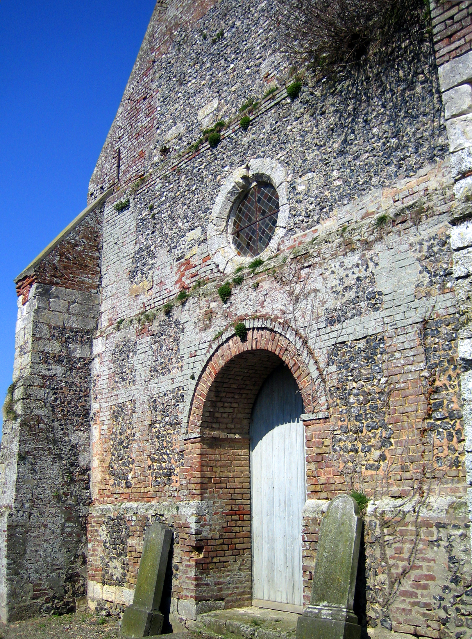 Saint-Maxent (Somme, France)